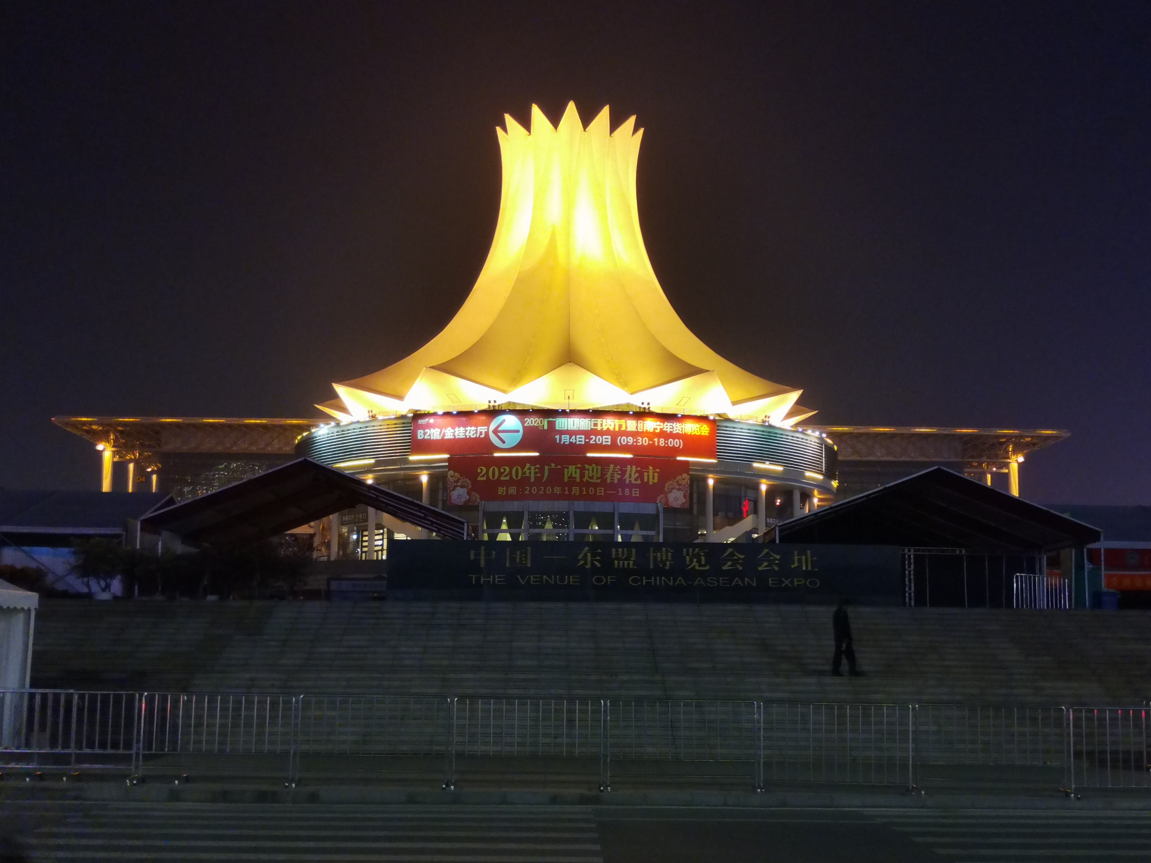 南宁国际会展中心，是中国东盟博览会（CAEXPO）永久会址